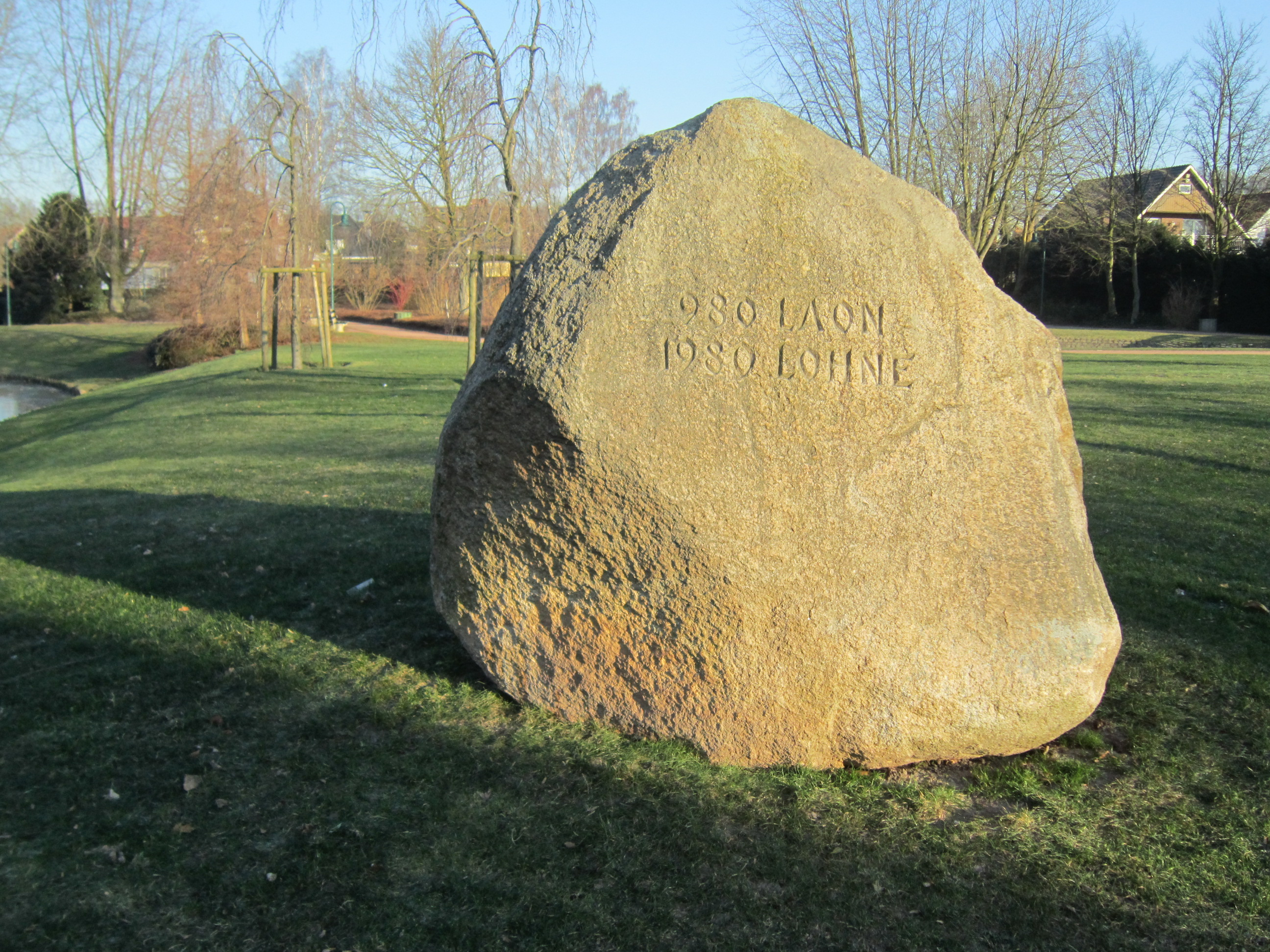 "Lohner Stein" im Stadtpark Lohne (Oldenburg)